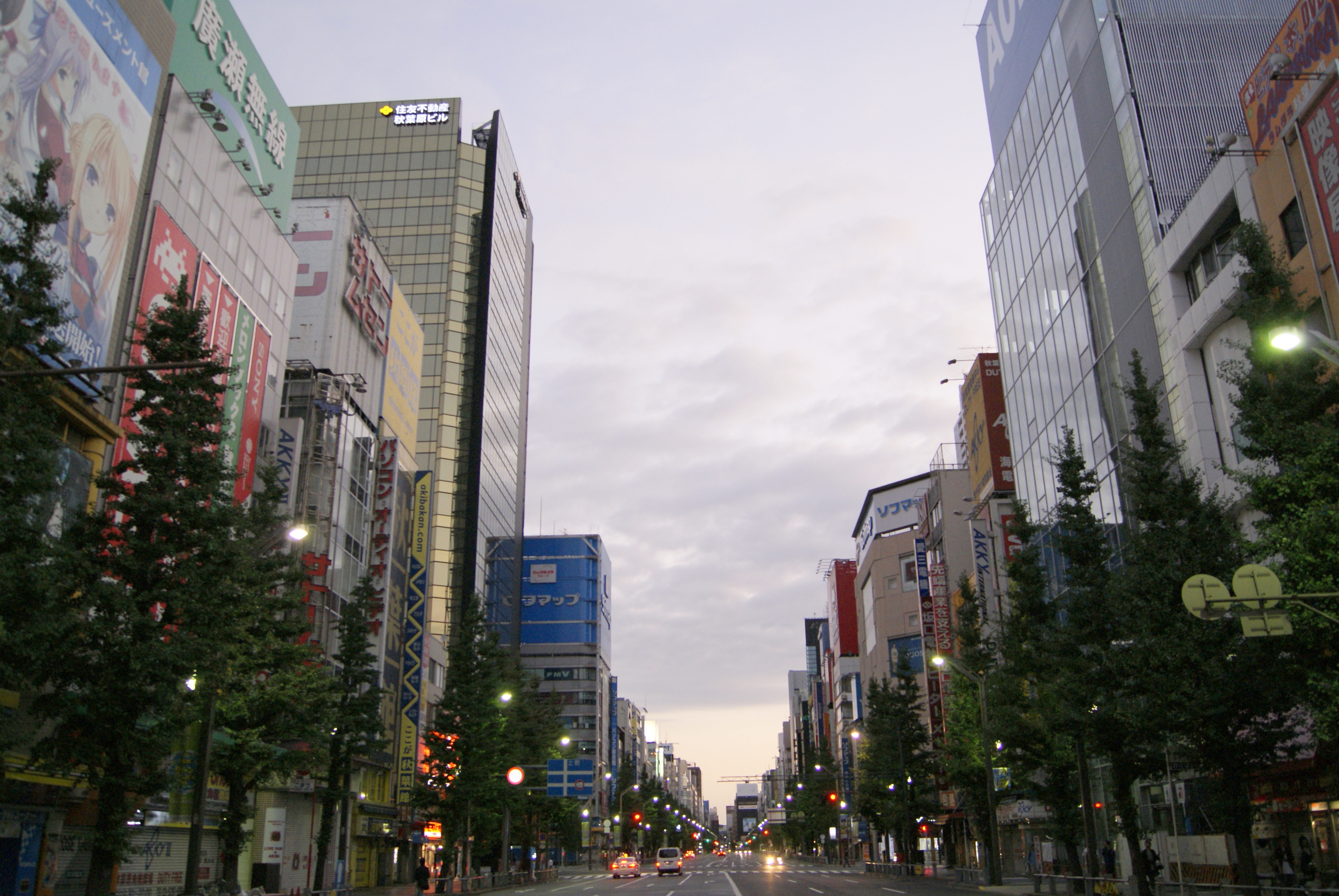 電気街の夜明け